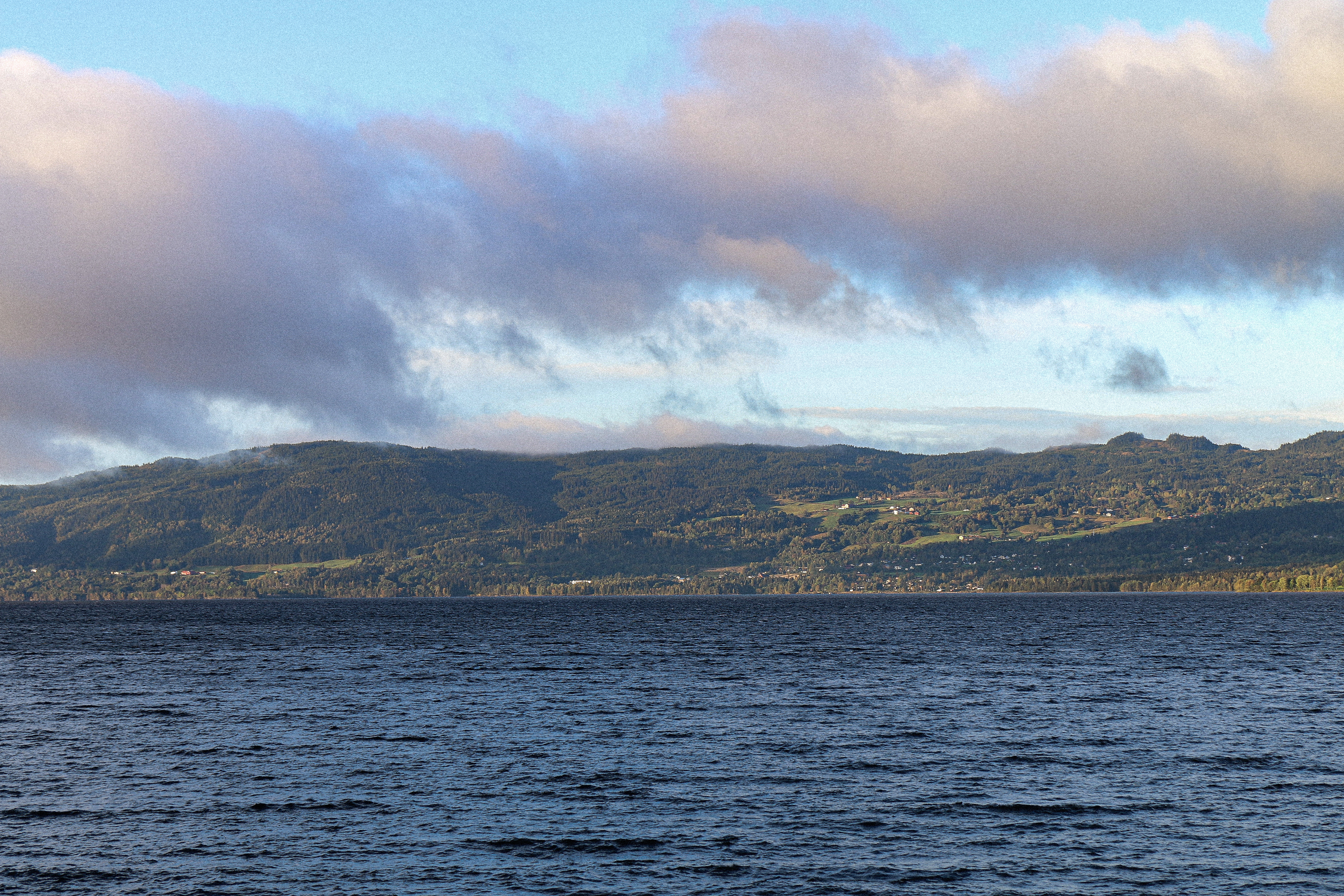 Bygda Feiring i Akershus.